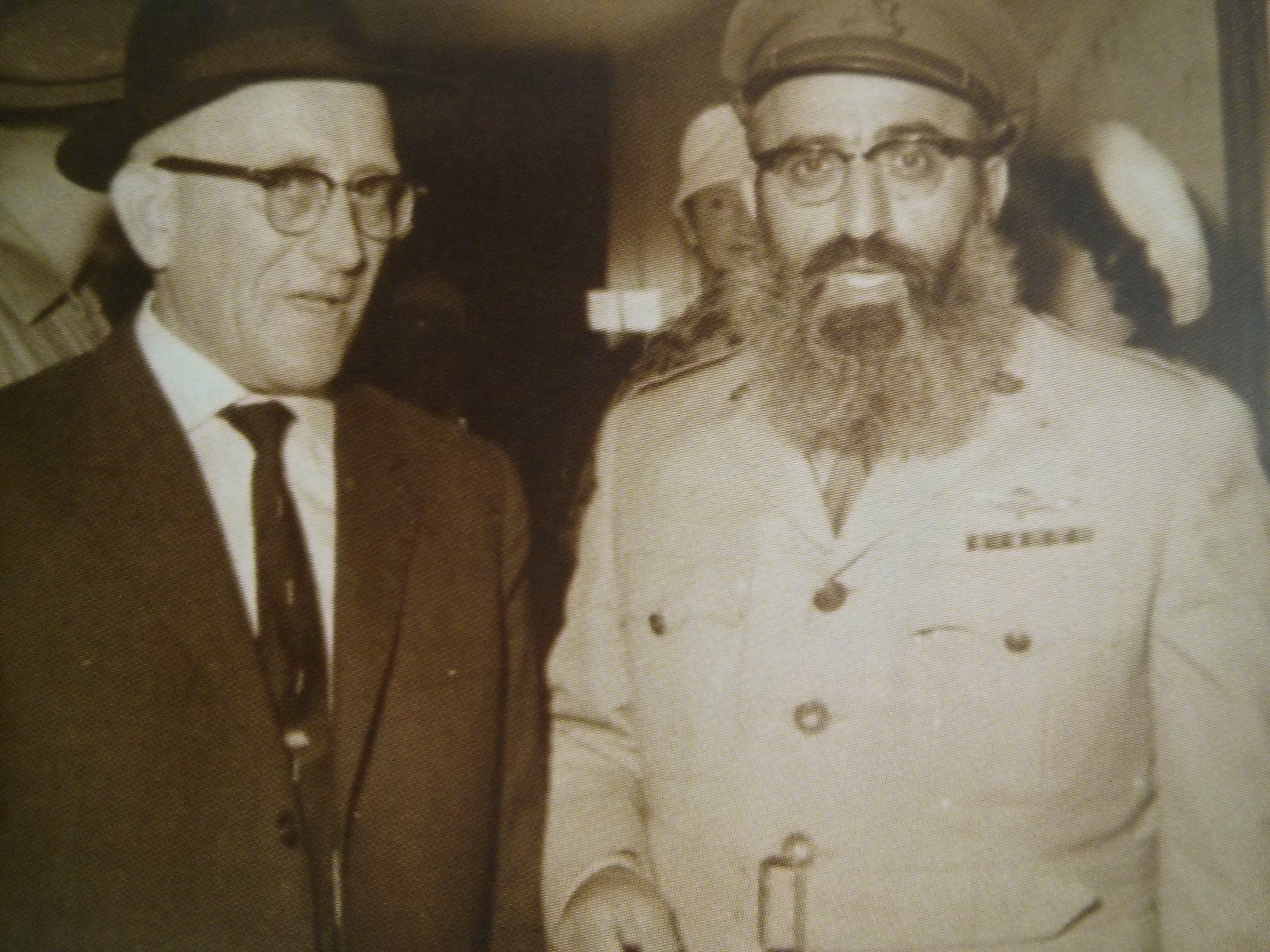 יחיאל אליאש עם הרב גורן